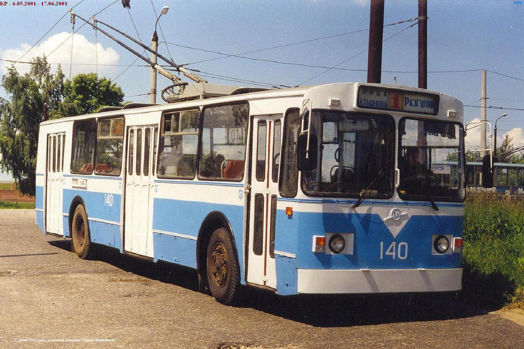 140 после капитального ремонта